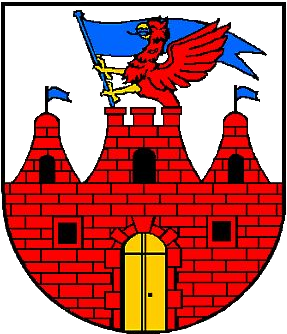 Wappen der Stadt Tribsees bis 2000